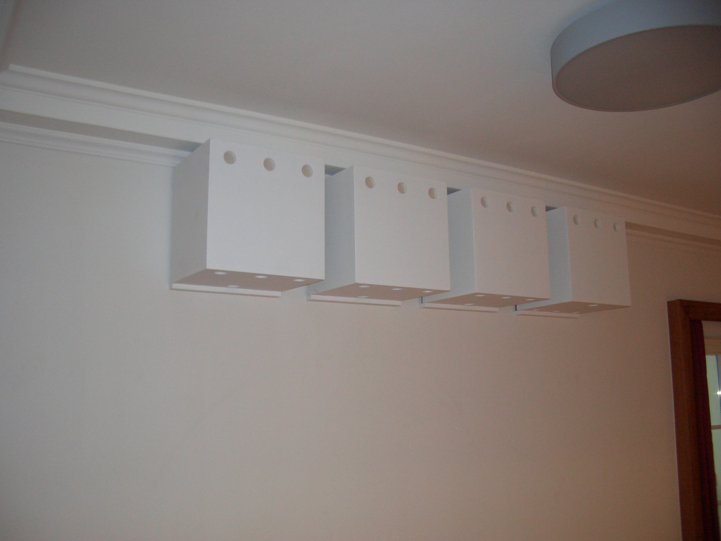 Resonator bt3